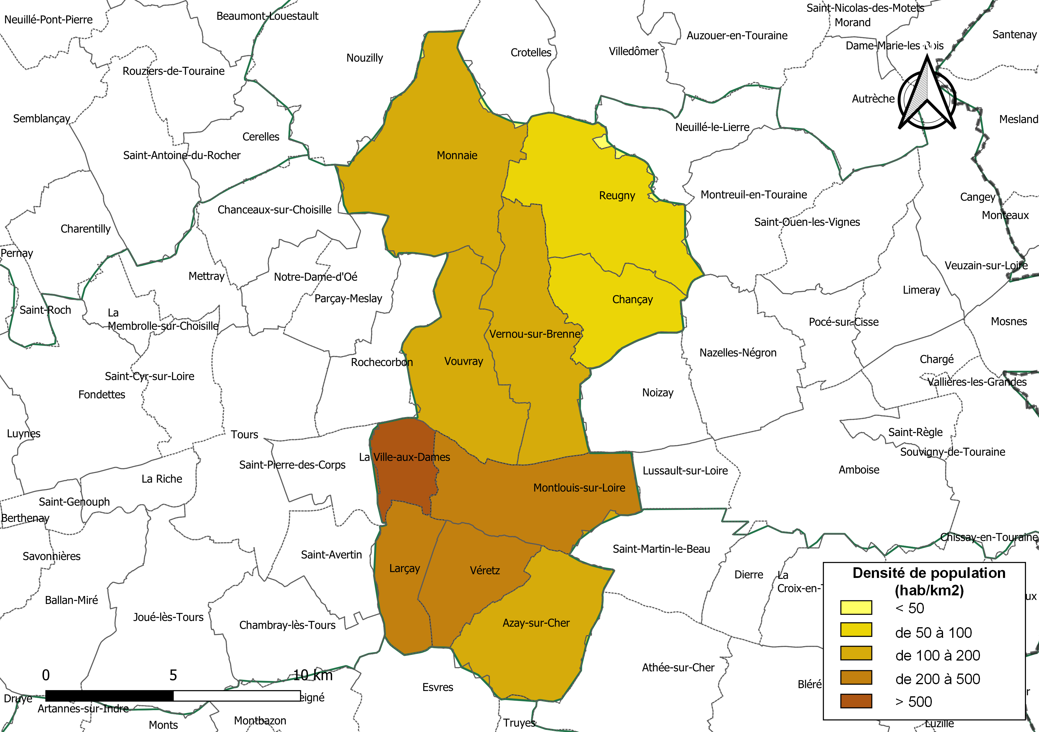 Carte des densités de population (millésimée 2016) des communes de la communauté de communes la Communauté de communes Touraine-Est Vallées, département d'Indre-et-Loire, France. Composition au 1er janvier 2019.